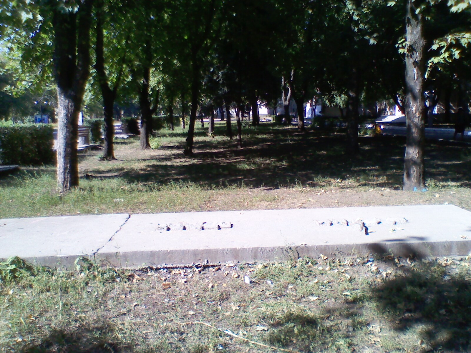 Pomnik sierpa i młota w Krasnoarmijsku.